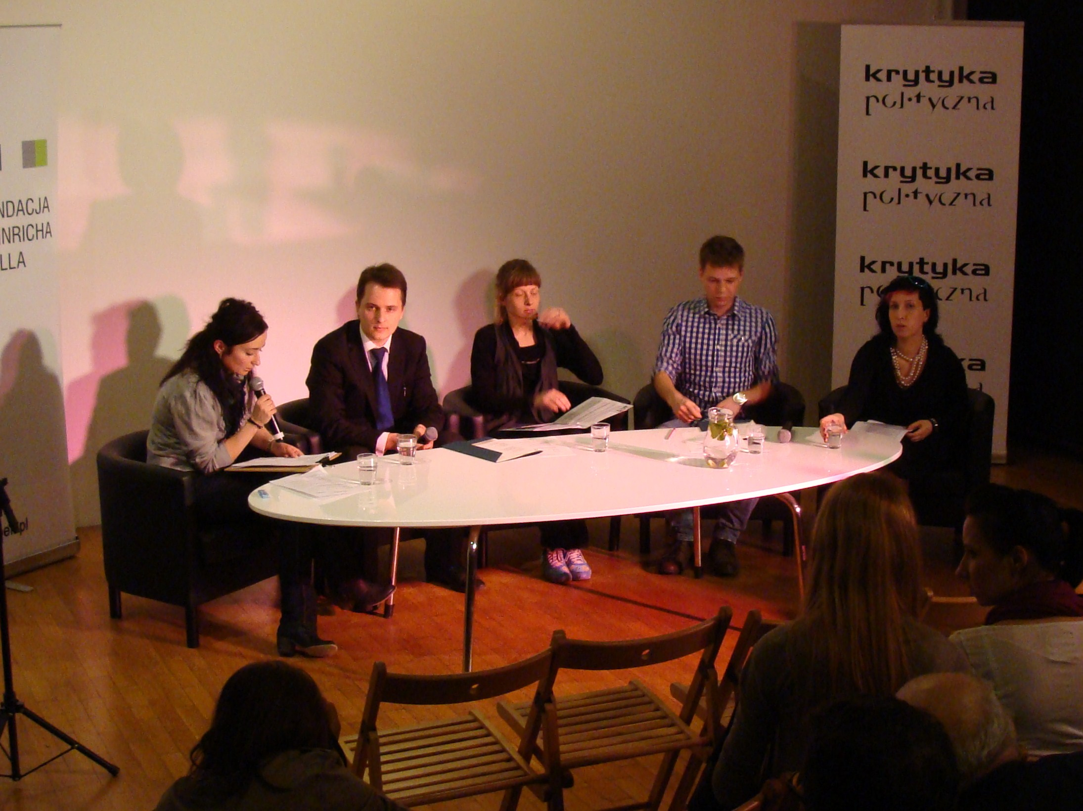 Recytacja białoruskiej literatury w Krytyce Politycznej na ul. Nowy Świat w Warszawie.